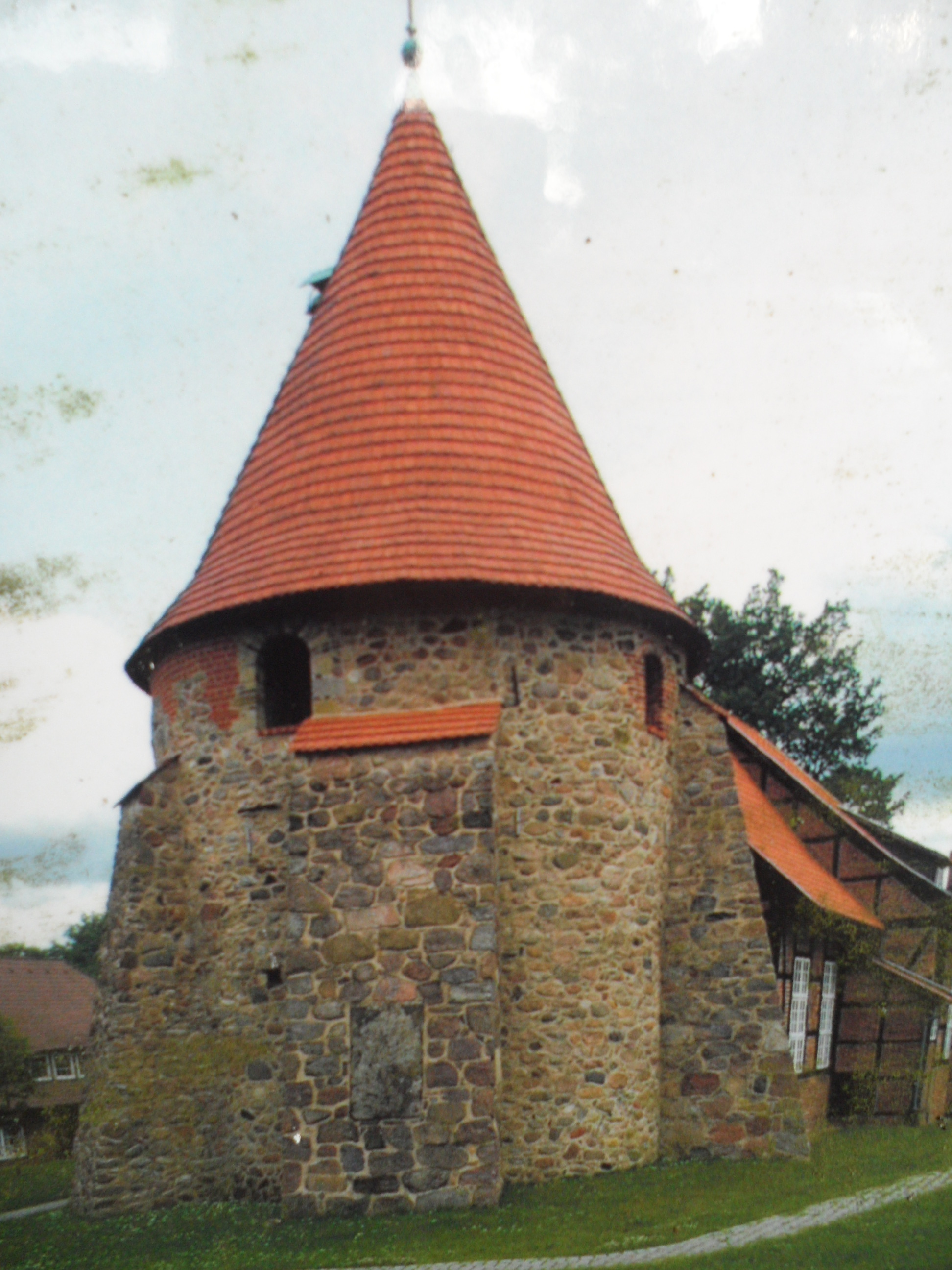 St. Laurentius-Kirche Stederdorf Sakristei